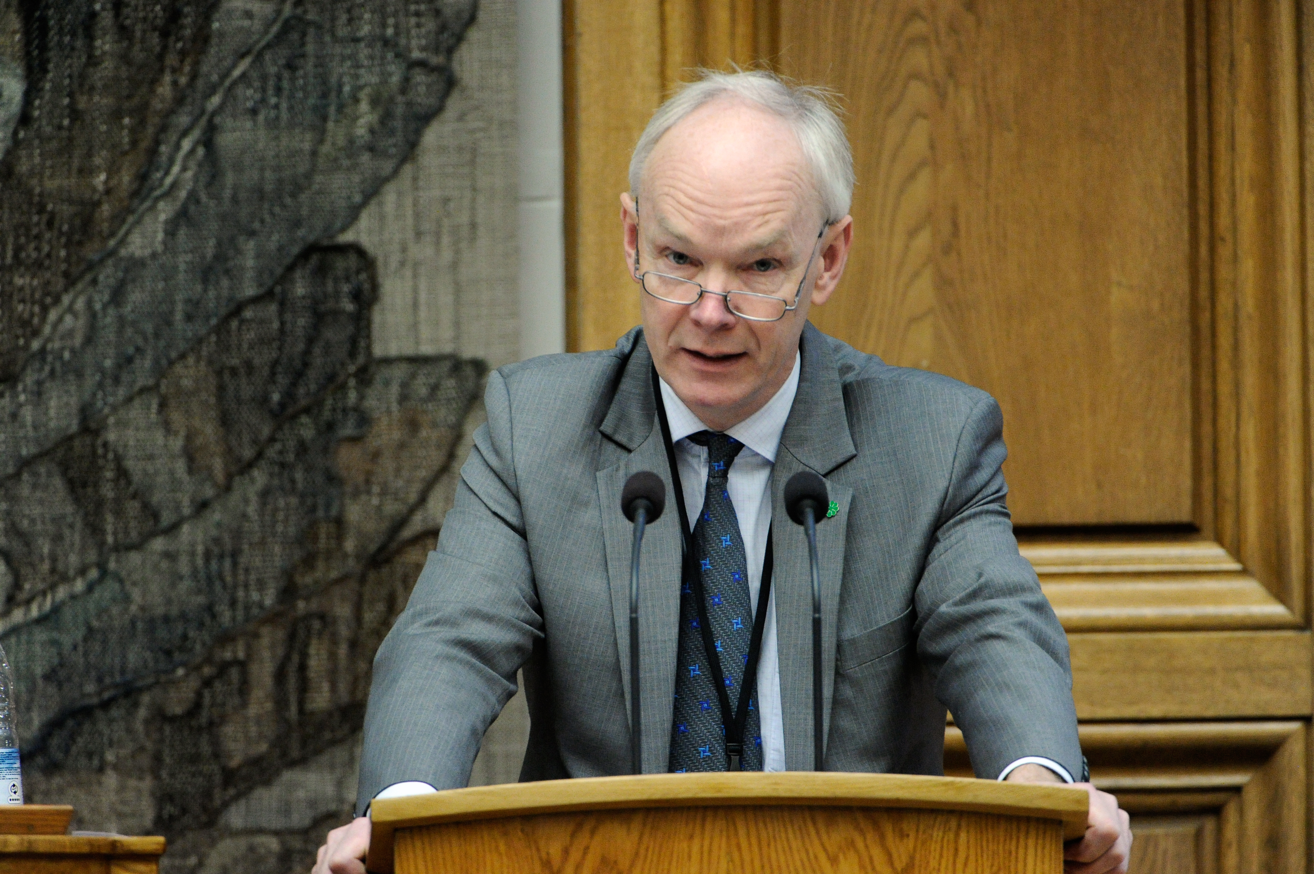 Per Olaf Lundteigen (Sp) Norge, Nordiska rådets session 2011 i Köpenhamn